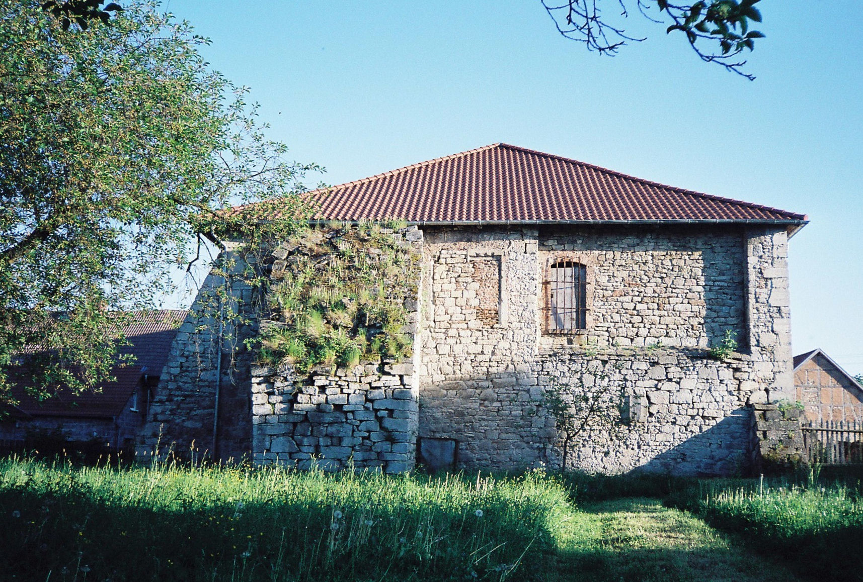 Herrenhaus der Bültzingslöwen in Haynrode, nördliche Giebelseite